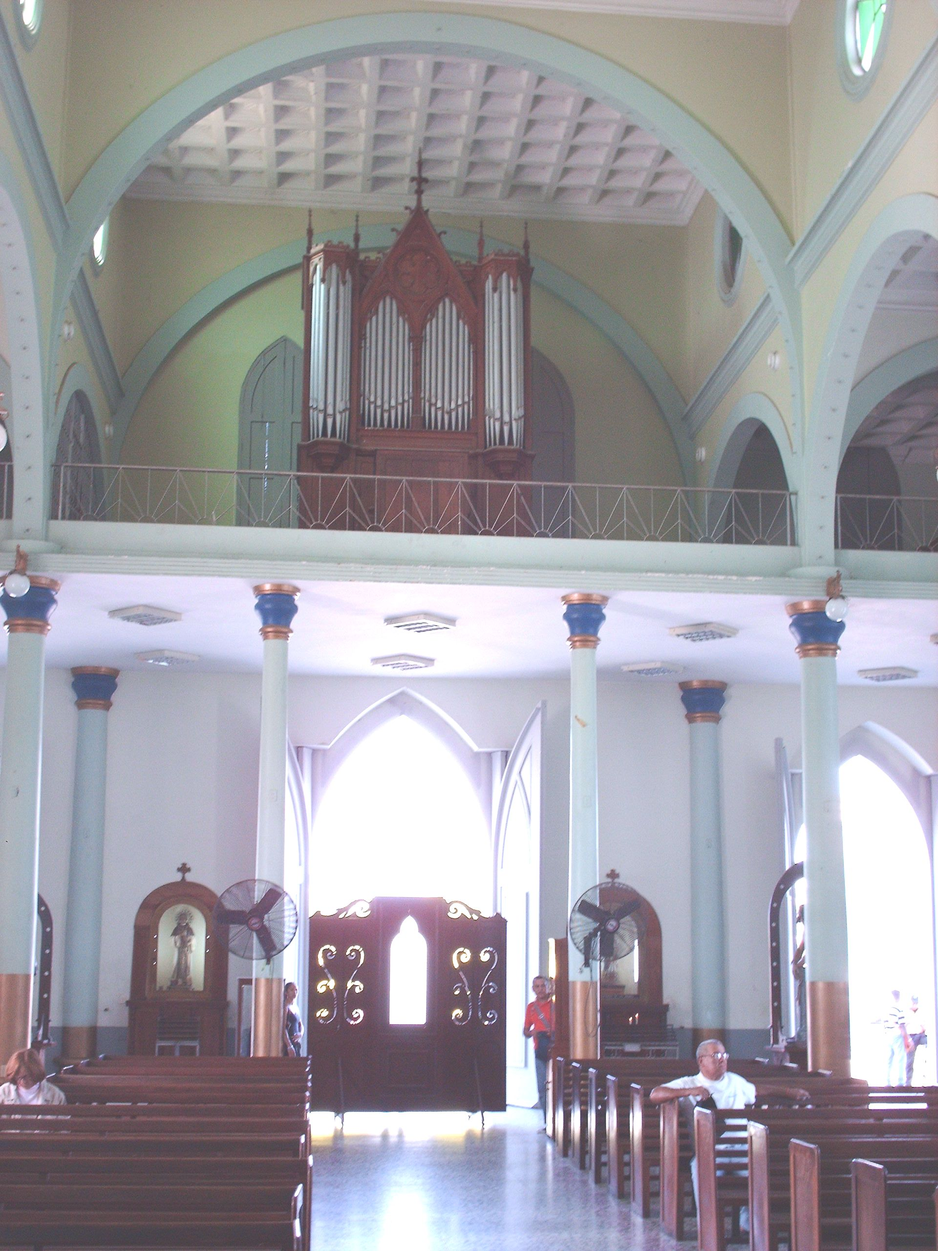 Interior de la Iglesia de Santa Bárbara, Maracaibo, Estado Zulia, Venezuela.